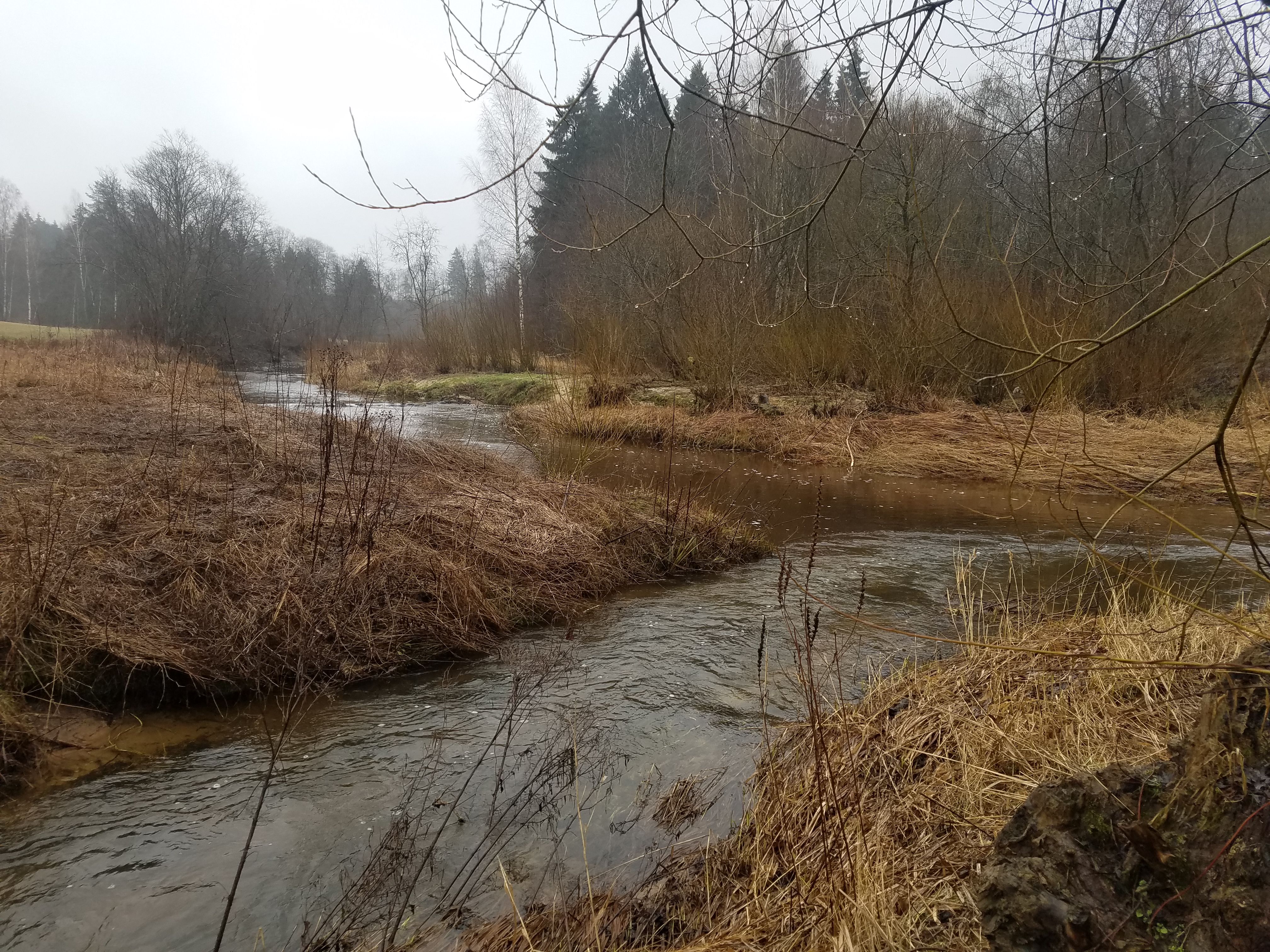 Santaka su Babrungu